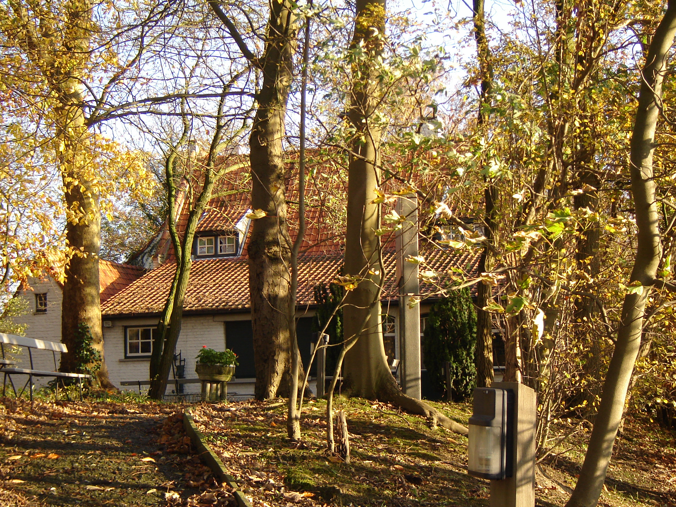 Het Lijsternest. House of writer Stijn Streuvels, now a museum. Located in Ingooigem, Anzegem, West-Flanders, Belgium